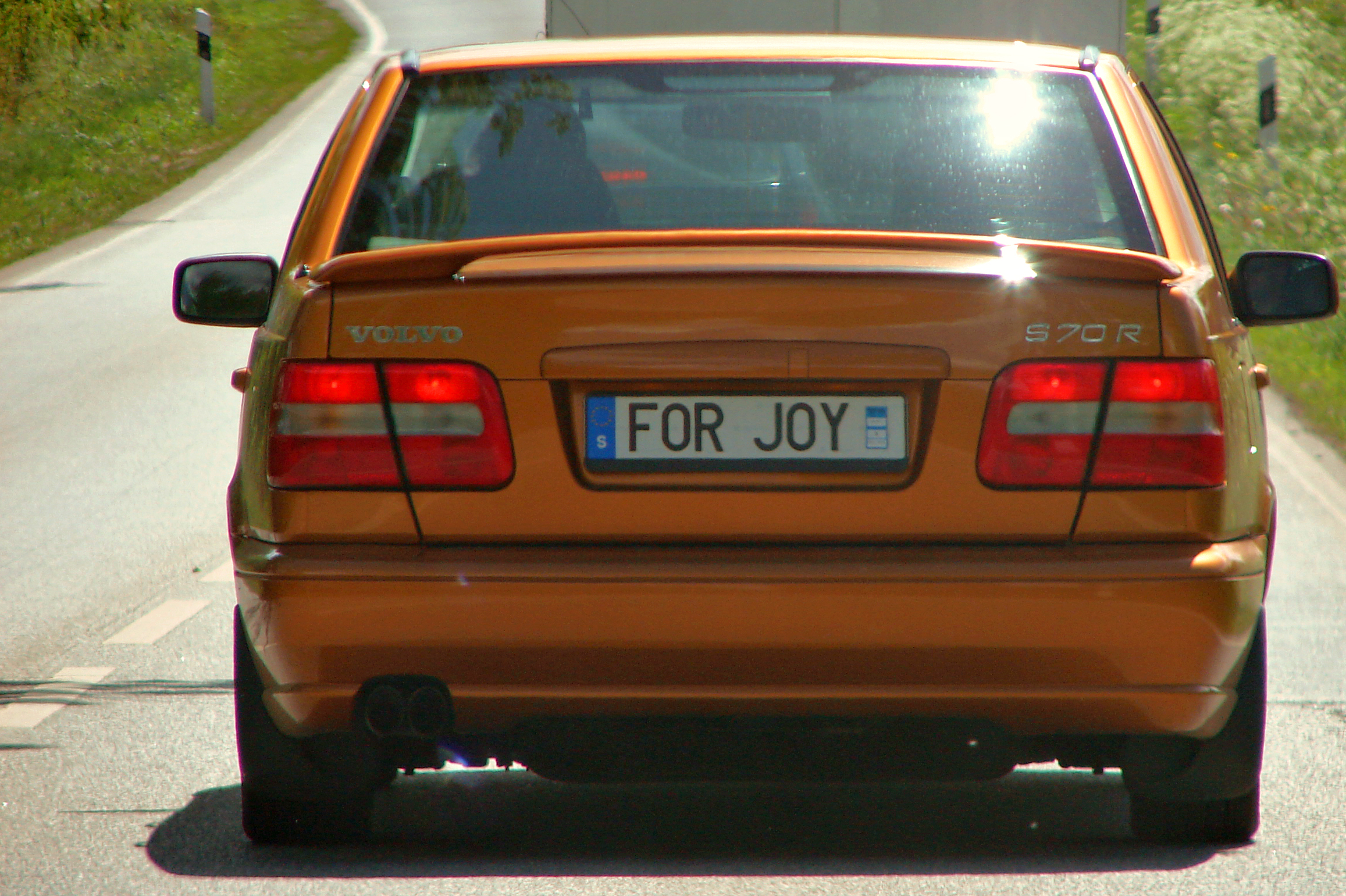 German text:Wunschkennzeichen an einem schwedischen PKW. Fotografiert in Schleswig-Holstein im Mai 2006. Eigenes Foto. Translation: Personalized car plate on a Swedish car. Photographed in Schleswig-Holstein, Germany, May 2006. Own photo.